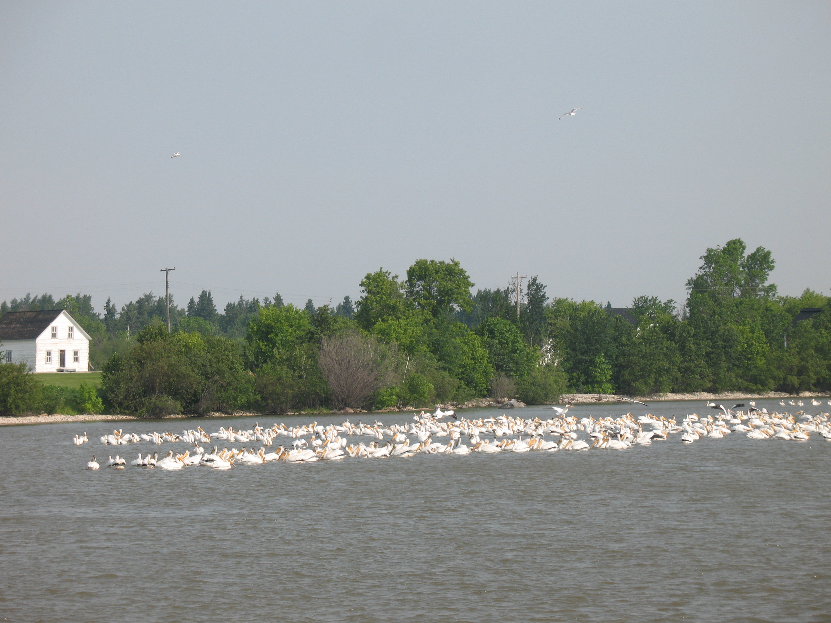 Pelikane auf Hecla Island im Lake Winnipeg, Manitoba